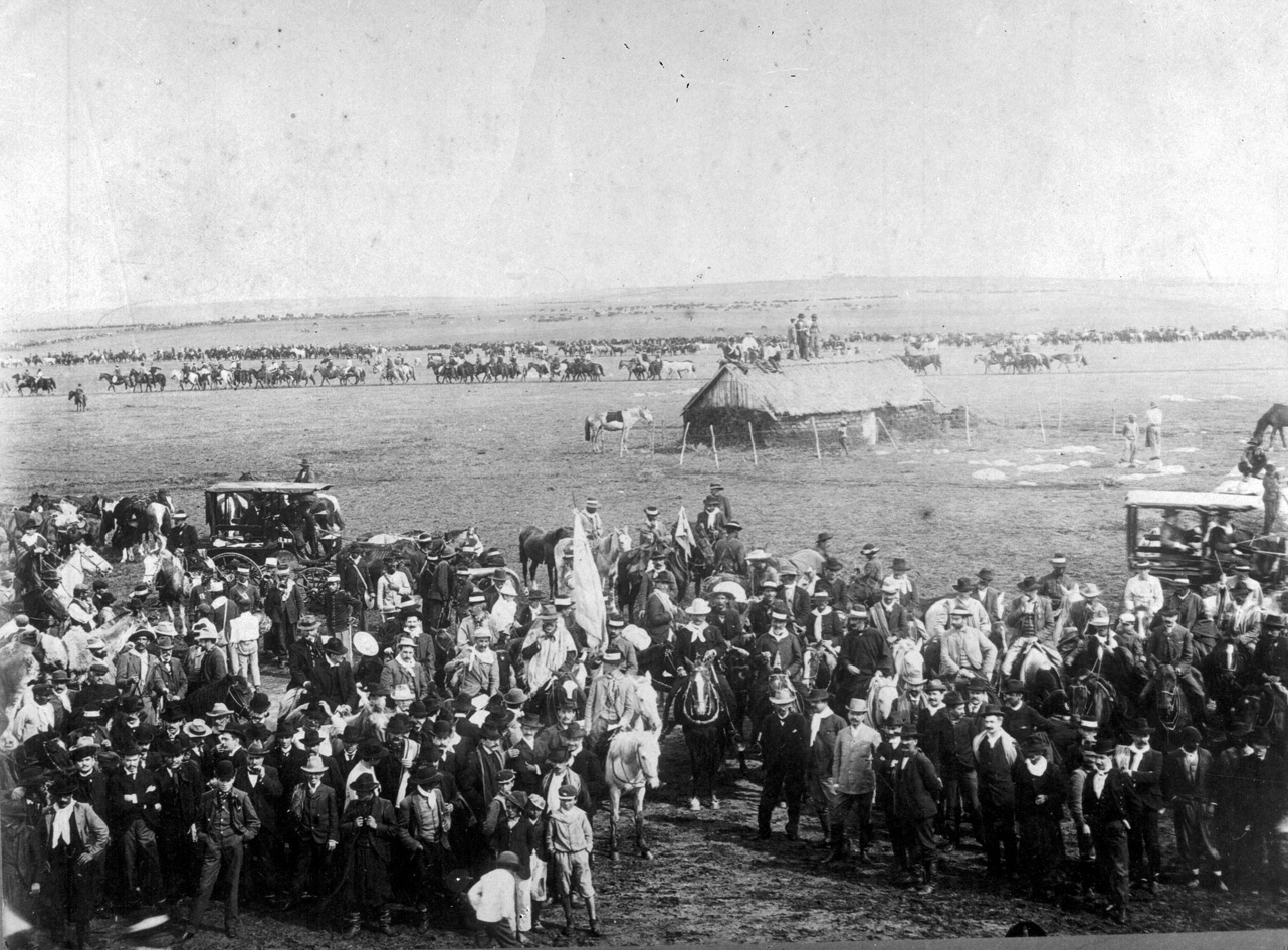 Fotografía del militar y caudillo de Uruguay Aparicio Saravia junto a sus comandantes de división y alrededor de 20.000 hombres, en el desfile del 30 de marzo de 1903 en la localidad de Nico Pérez.